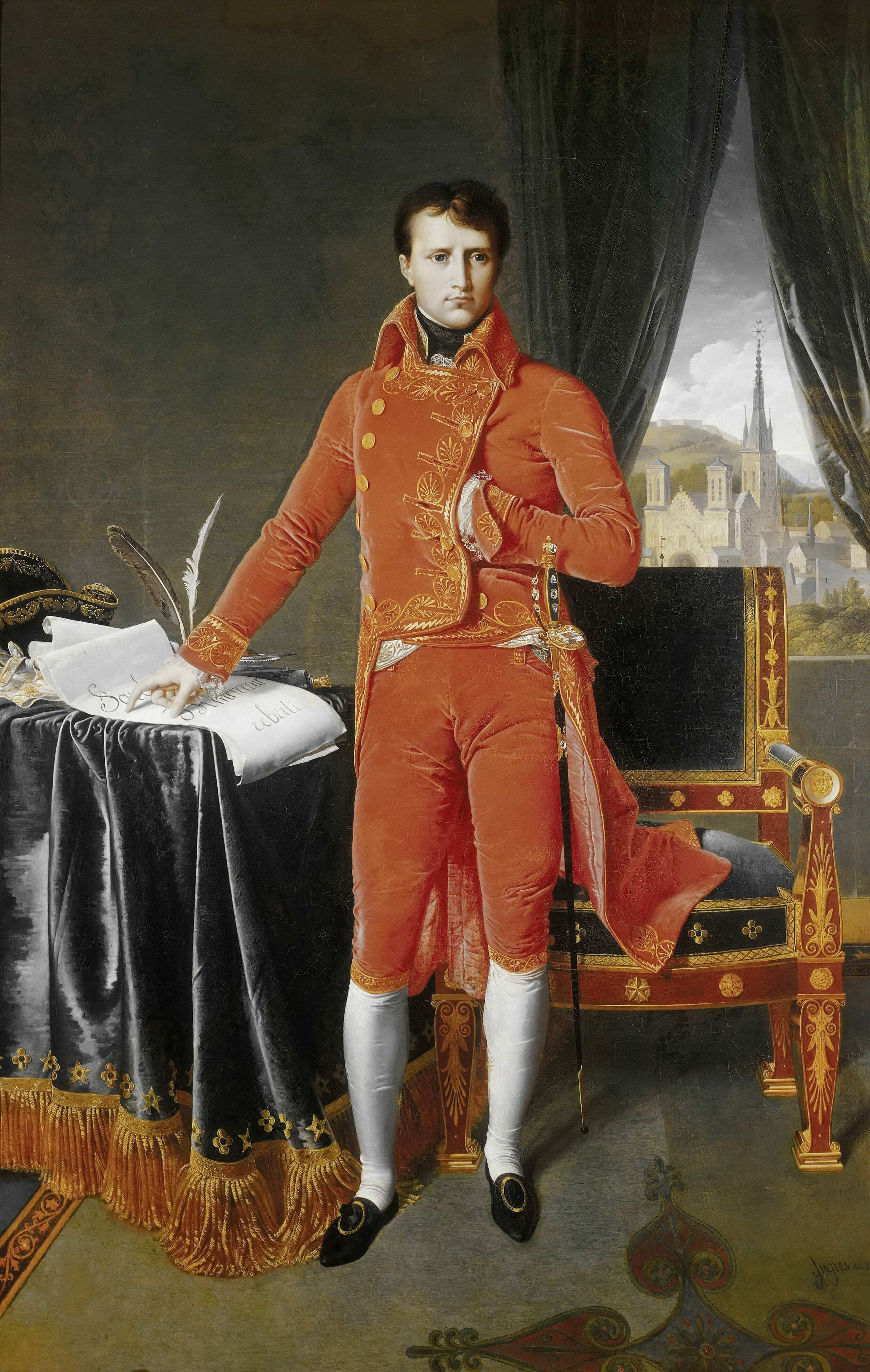 Porträt Napoleon Bonapartes als Erster Konsul